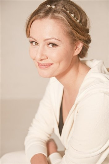 Портрет депутата ГД РФ Марии Александровны Кожевниковой, автор фото Игорь Василиадис